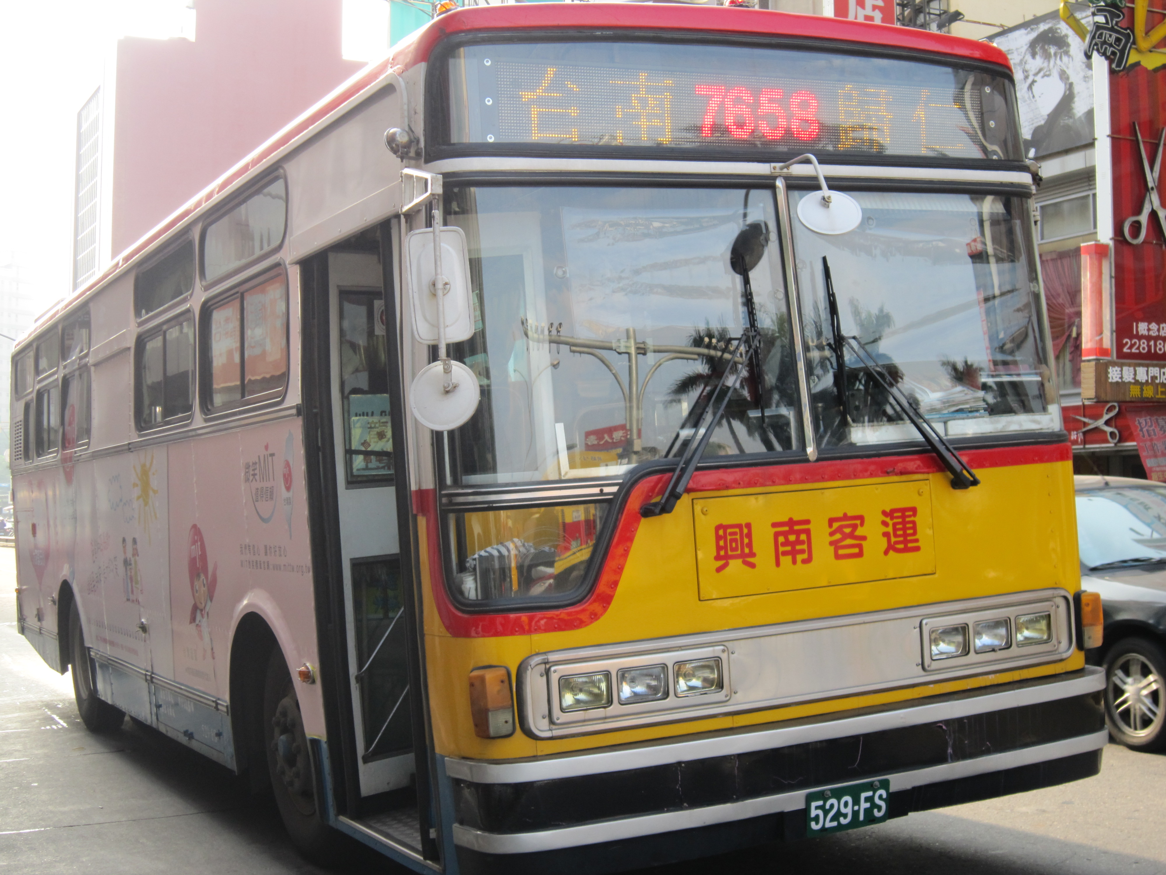 興南客運前欣欣客運2001年五十鈴大客車529-FS。